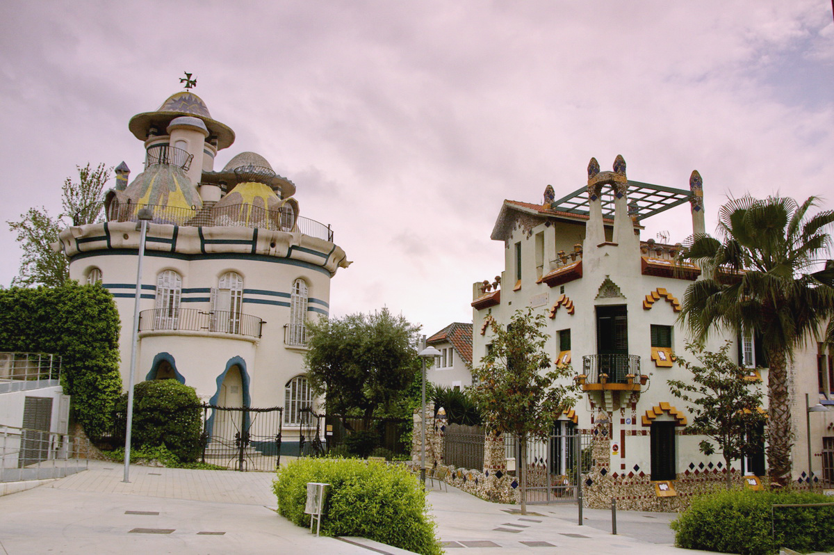 Torre de la Creu obra de l'arquitecte modernista Josep Maria Jujol el 1913 (esquerra) i Villa Elena, obra de Ignasi Mas Morell de 1910 (dreta), a Sant Joan Despí al Baix Llobregat, Catalunya.